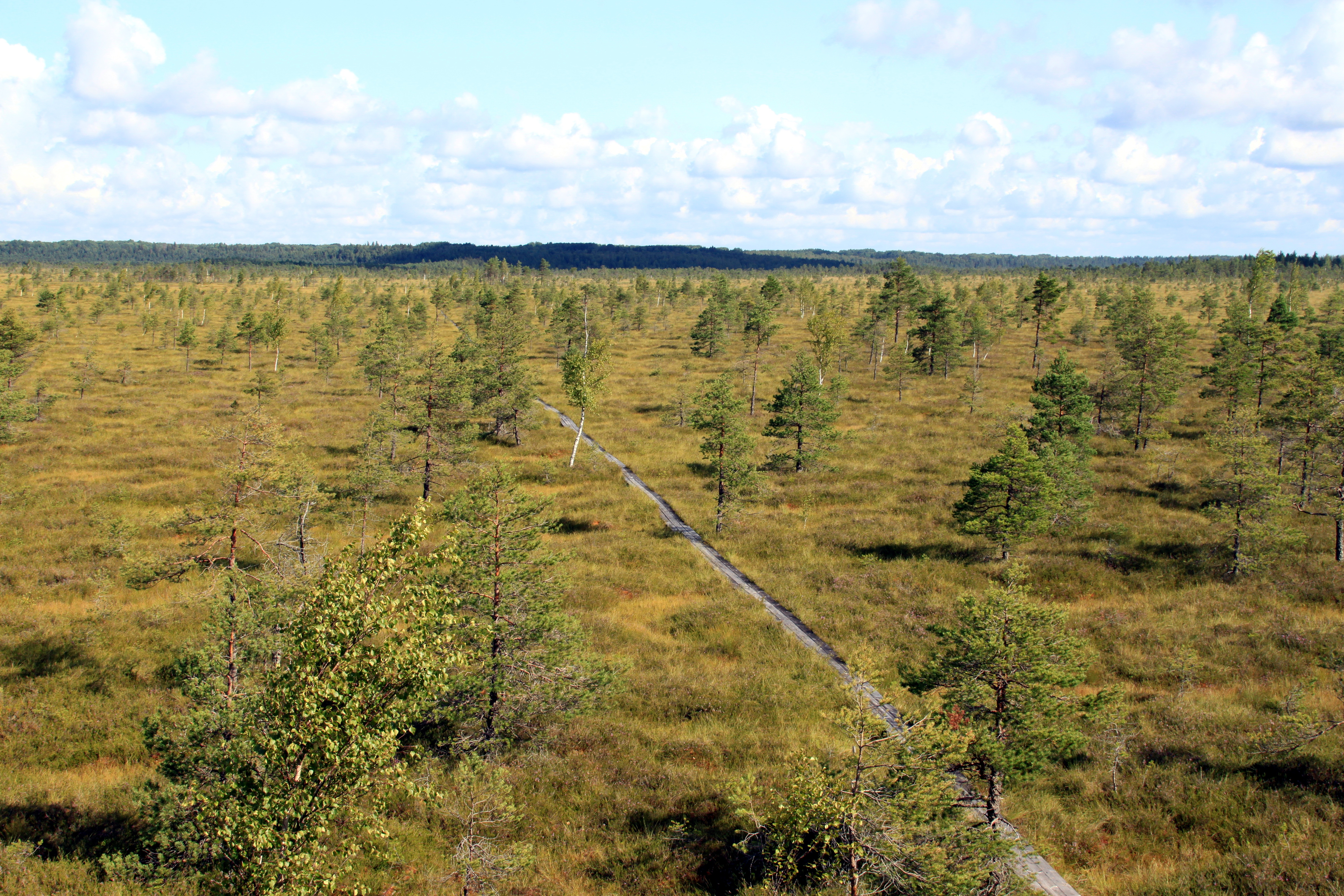 Nigula raba